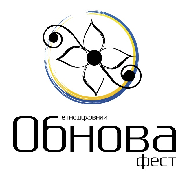 етнодуховний "Обнова-фест"